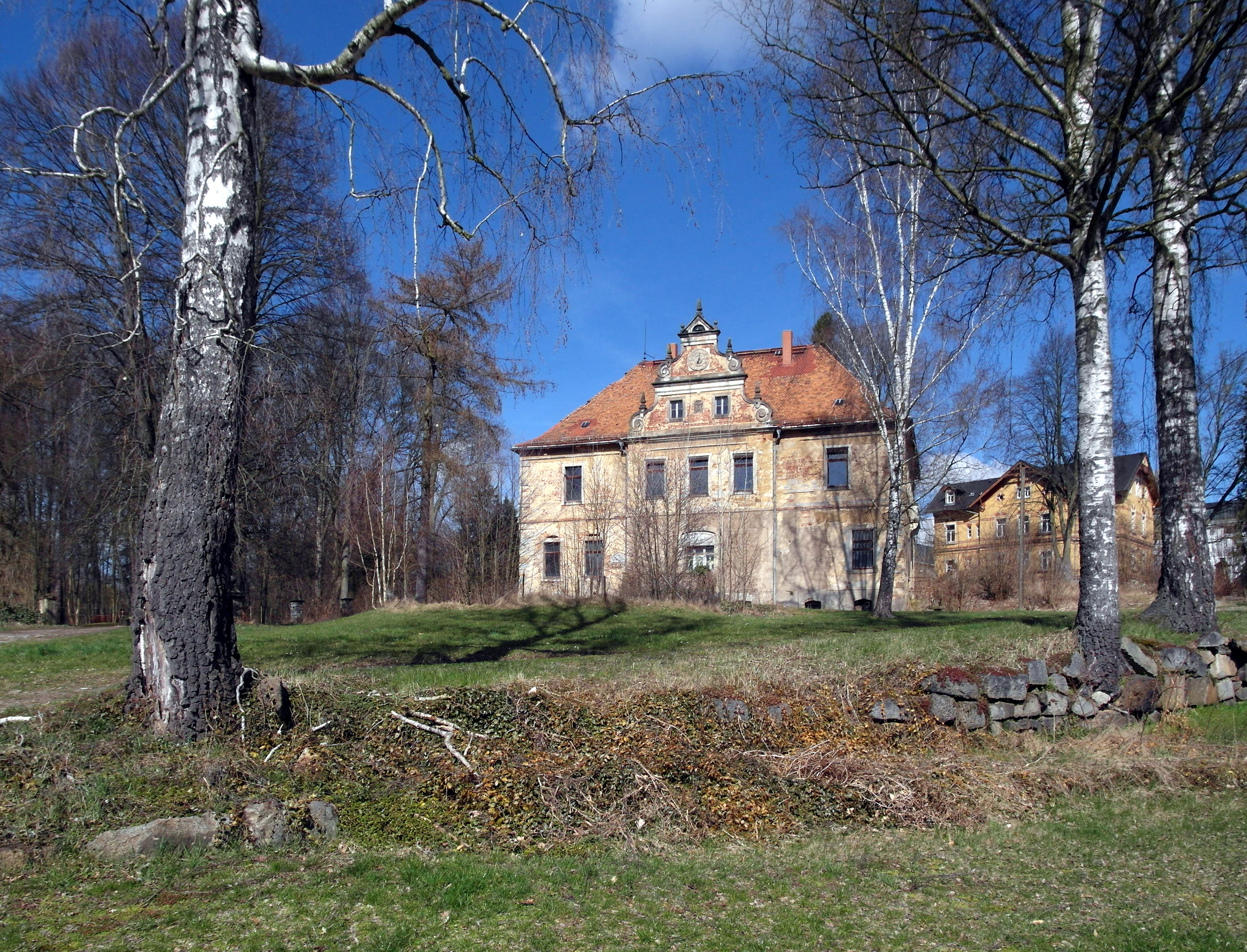 26.03.2017 02708 Großschweidnitz, Straße der Einheit 3: Das 1765 unter Gottlob August von Leubnitz errichtete eingeschossige Herrenhaus wurde 1882 unter Gustav Klette umgebaut und aufgestockt. Das Rittergut war ab 1898 Staatsbesitz und bis 1990 Volksgut. Heute Privatbesitz. Sicht von Süden. [SAM8635.JPG]20170326145DR.JPG(c)Blobelt